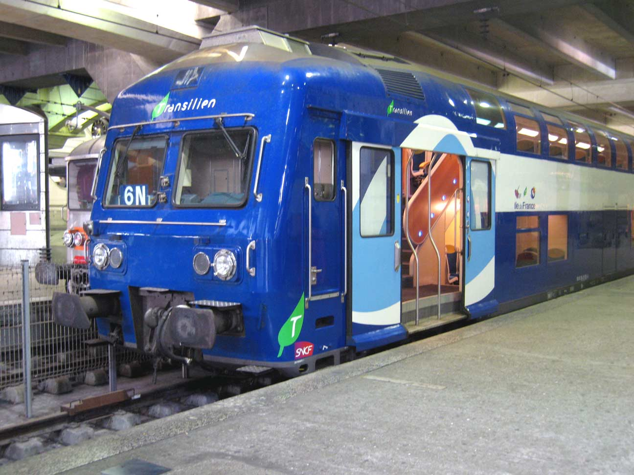 Rame de voitures banlieue à deux niveaux (VB 2N), gare Montparnasse Lieu : Paris, France Date : Juin 2006 Auteur : Pline photo personnelle